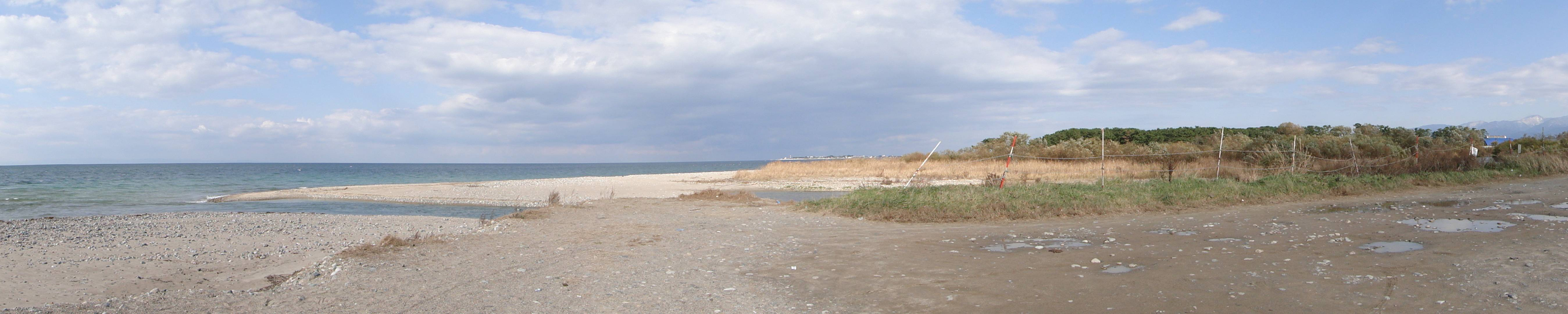 右手布施川と片貝川が合流地点から、左手富山湾。